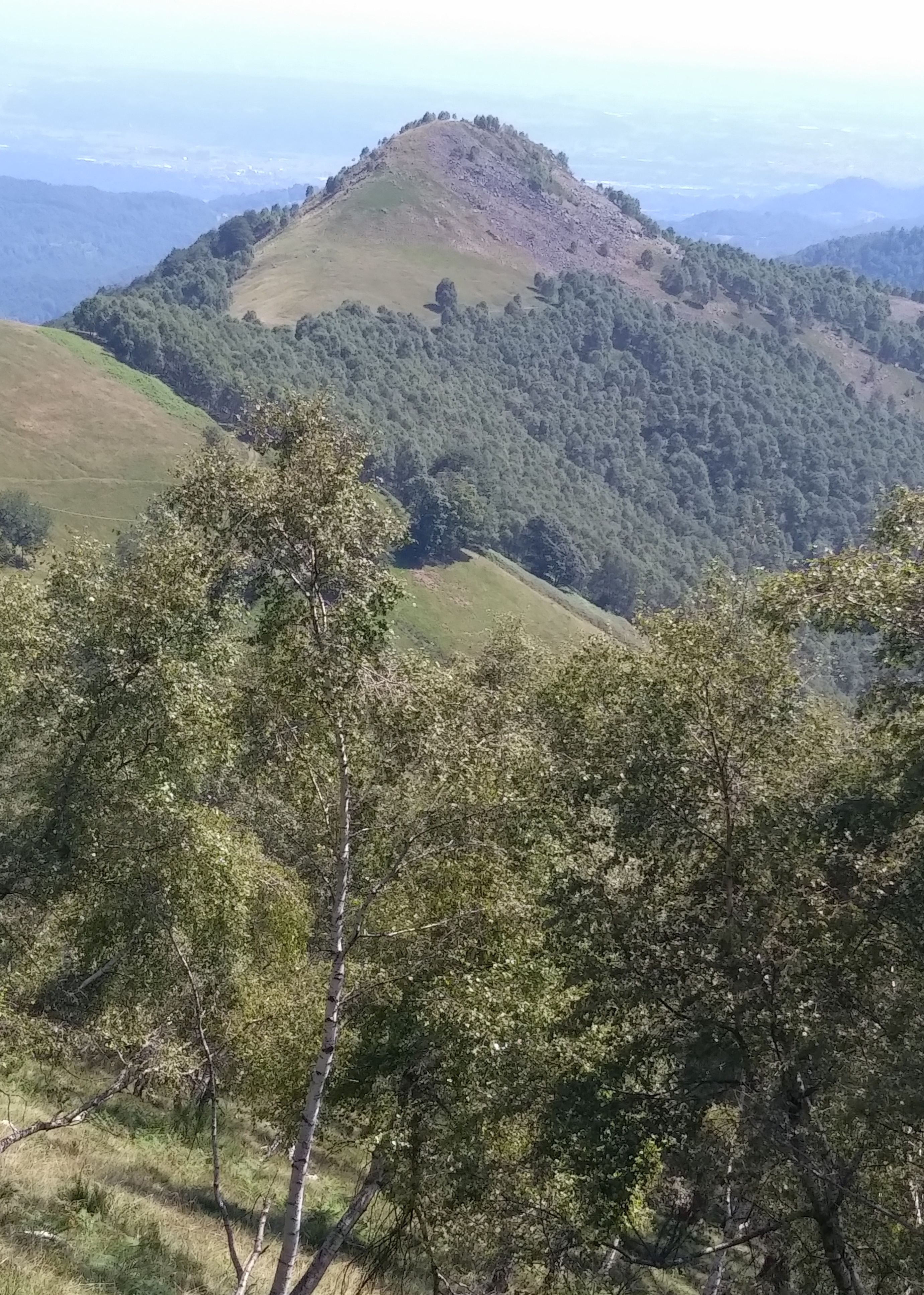 Il Monte Cavajone visto da nord (Alpi Biellesi)